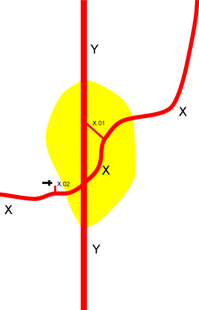 Ytterligare exempel på grenvägsmönster: grenväg till alternativ vägkorsning och grenväg till kyrka.